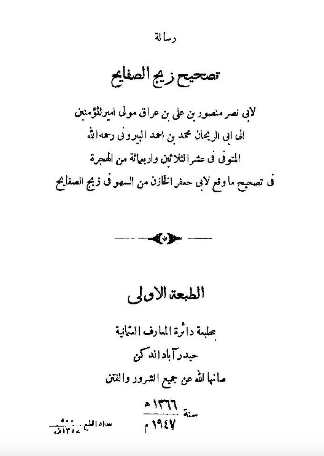 رسالة تصحيح زيج الصفائح لمنصور بن عراق